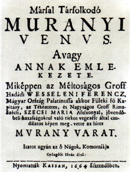 Gyöngyösi István: "Marssal társalkodó Murányi Vénus" c. műve első kiadásának címlapja (1664)